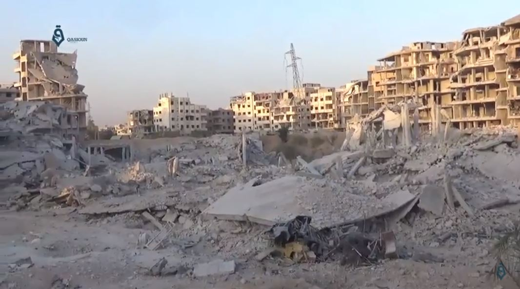 Ain Tarma, près de Damas, le 24 septembre 2017